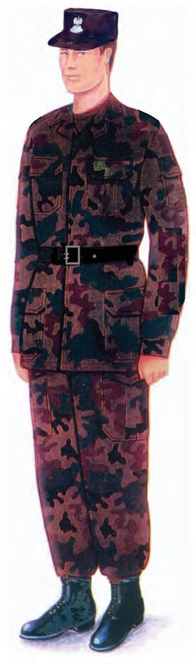 Ubiór polowy funkcjonariuszy noszących umundurowanie Wojsk Lądowych z mundurem polowym oraz z czapką polową